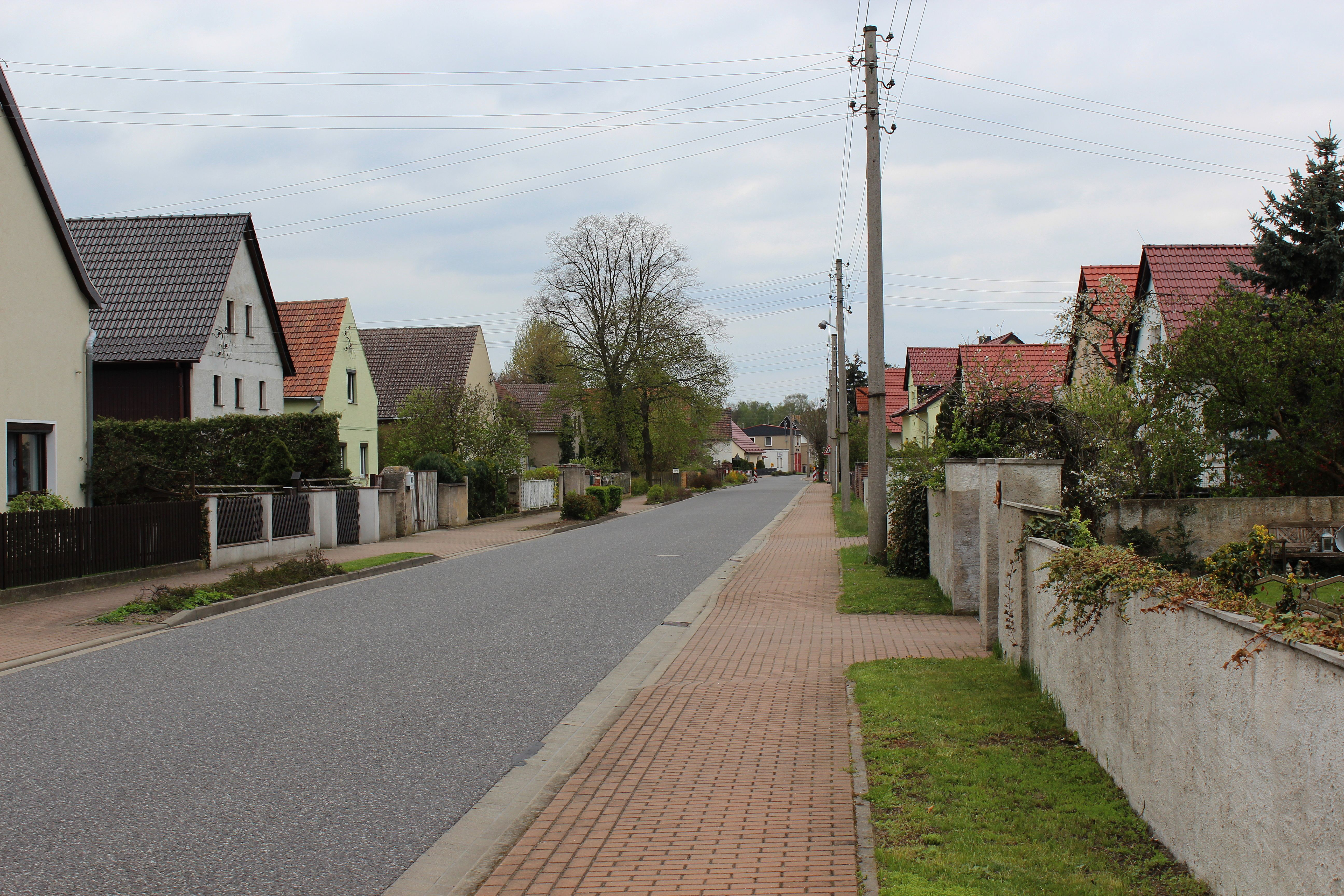 Zinsdorf.